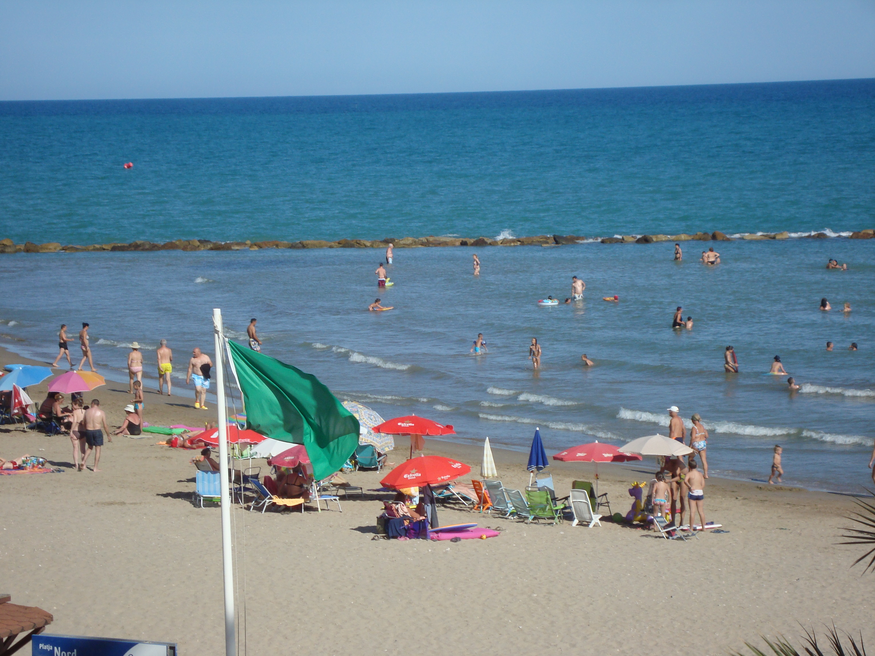 Playa Norte de Torreblanca, Castellón